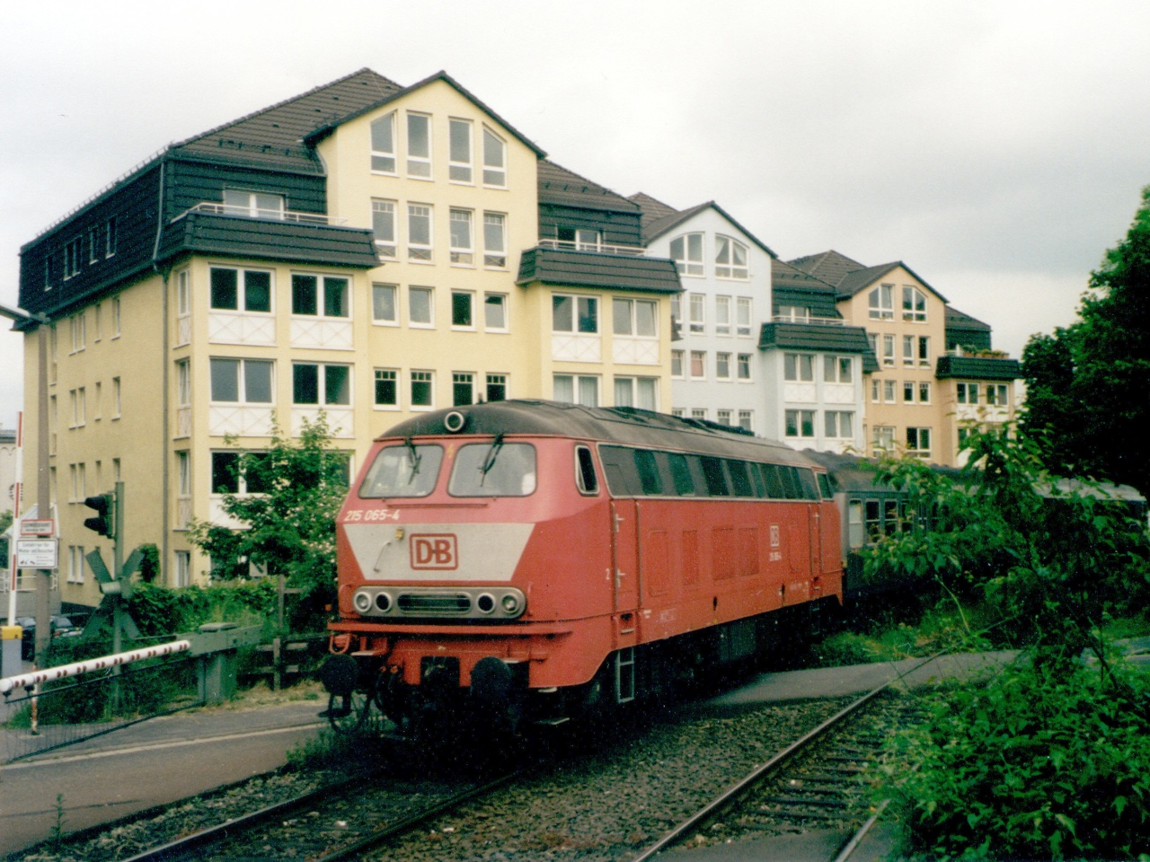 Schon im Stadtgebiet von Gießen befindet sich 215 065-4 am 25.05.99 mit ihrer RB 8422 aus Fulda.